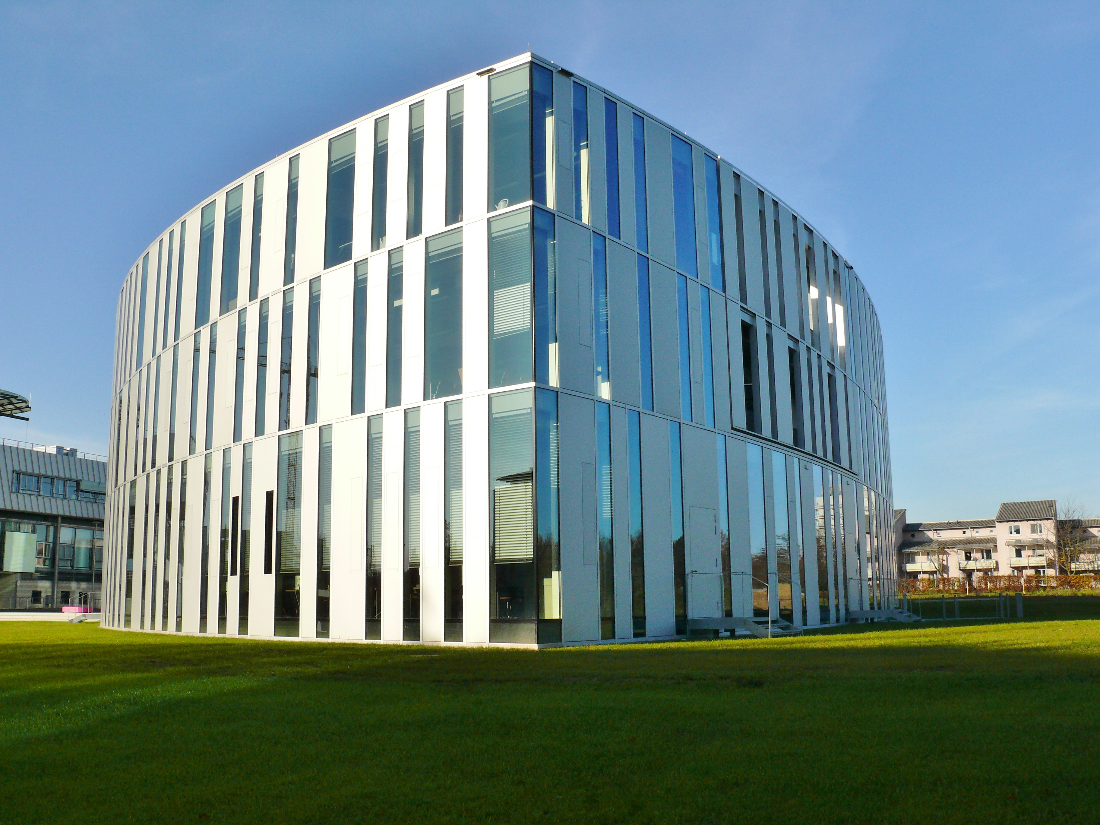 Hochschule der Medien in Stuttgart. Neubau von 2014, Fakultät Information und Kommunikation. Stirnseite.